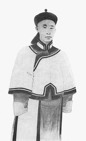 钟褀，姓马，字味春，汉军镶红旗人。清末官吏。儒生。